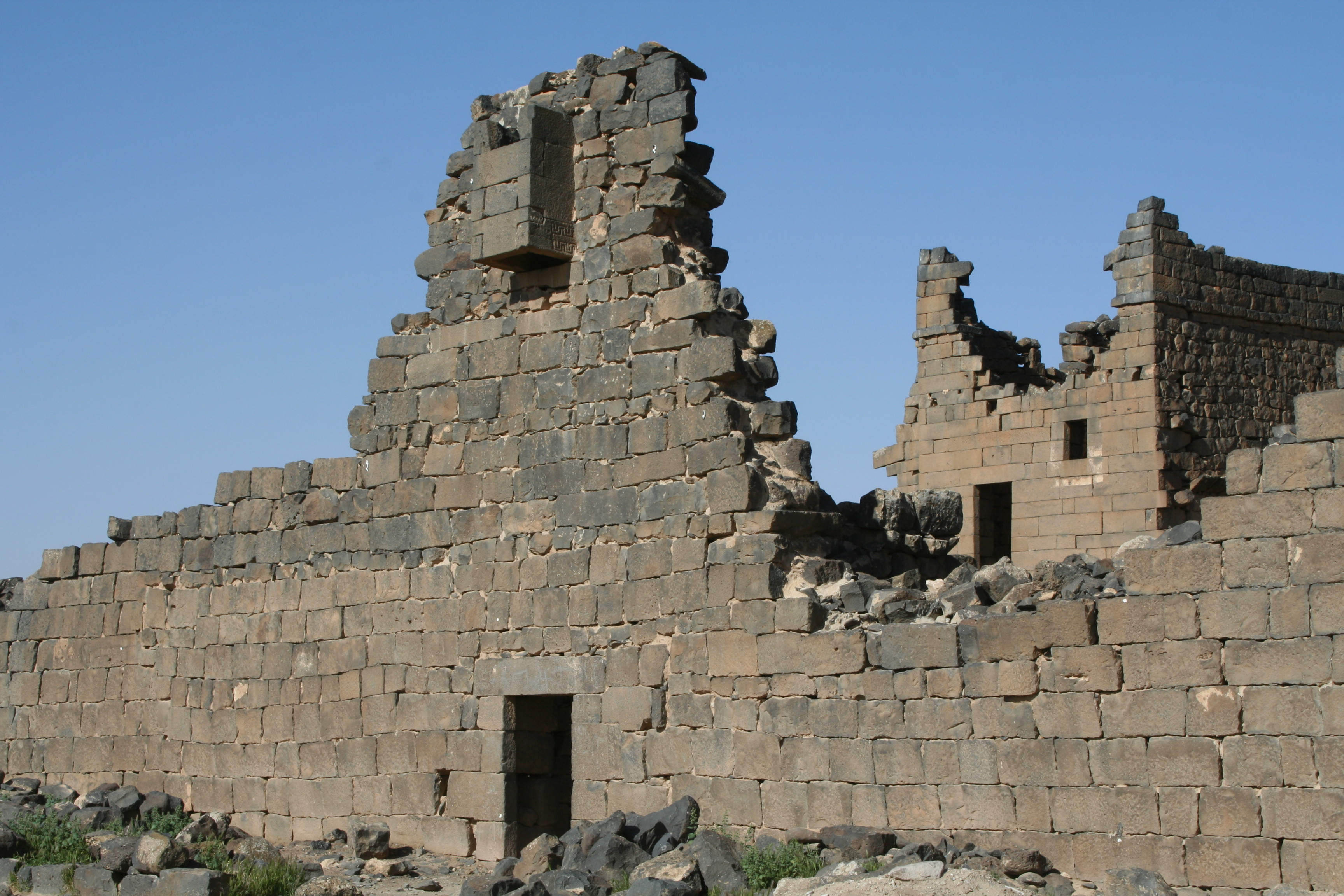 مدينة أم الجمال الأثرية، وتقع غرب الأردن قرب مدينة المفرق، وتمتاز بأحجارها السوداء البازلتية